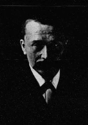 Prof. Jan Kastner (1860-1912)